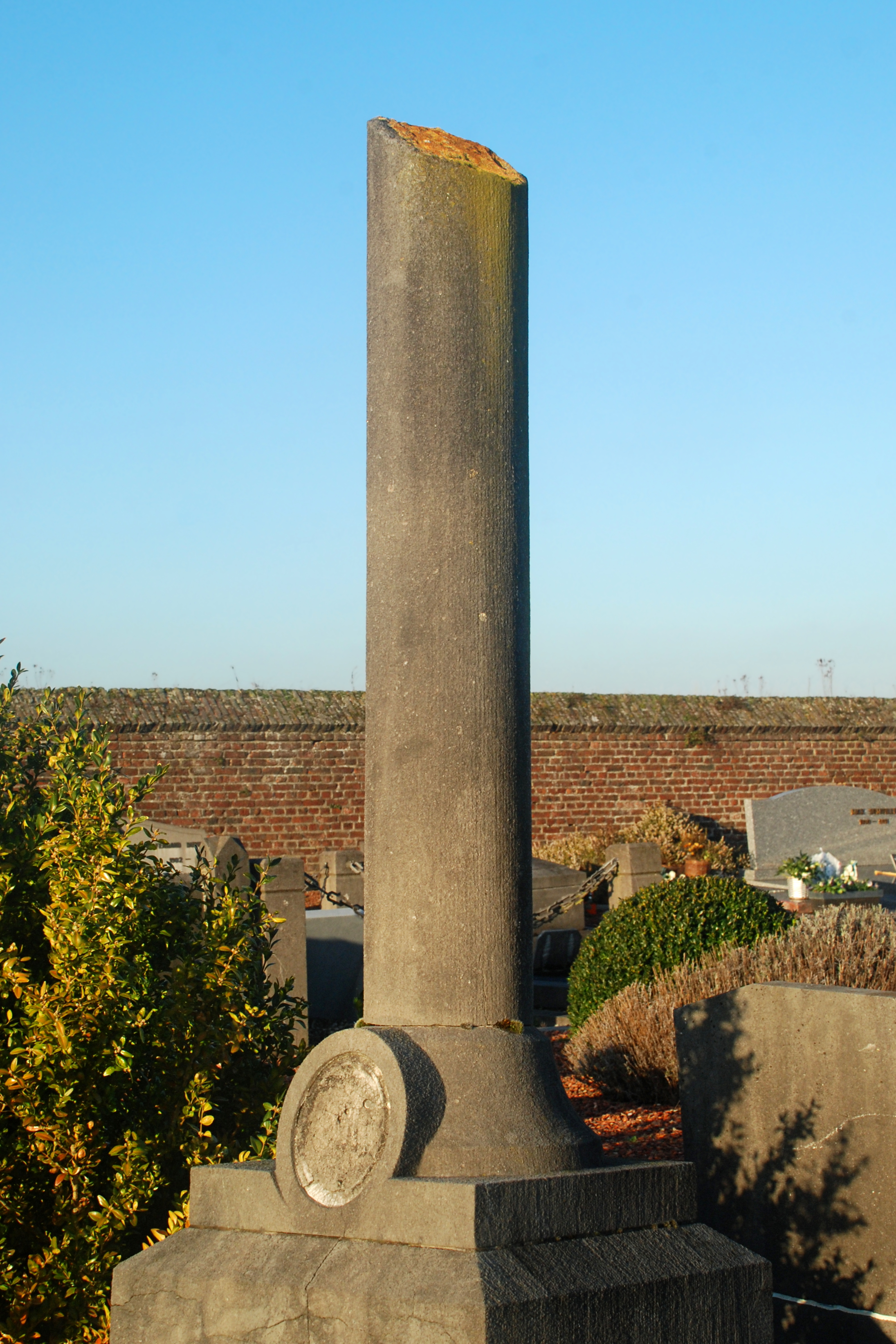 Belgique - Brabant wallon - Cimetière de Court-Saint-Étienne